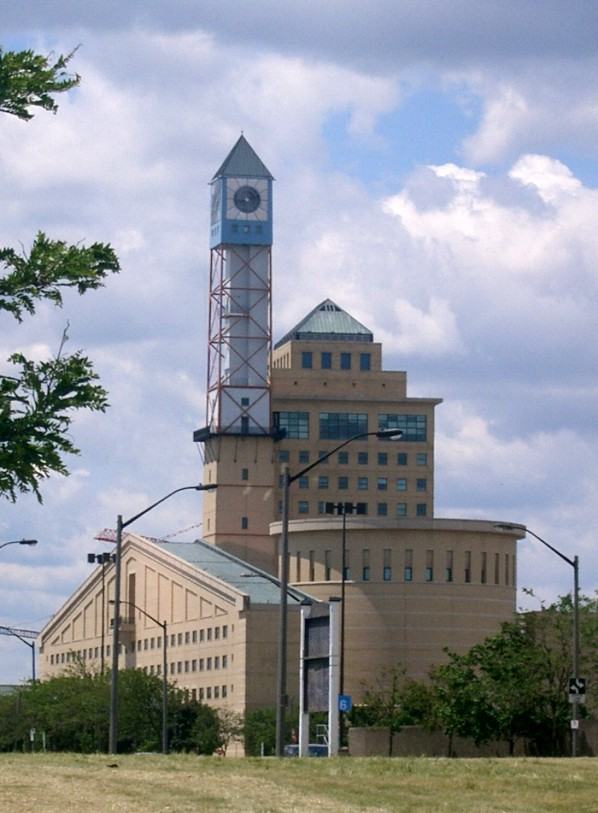 Mississauga, Ratusz Pawel Wajda, 2004